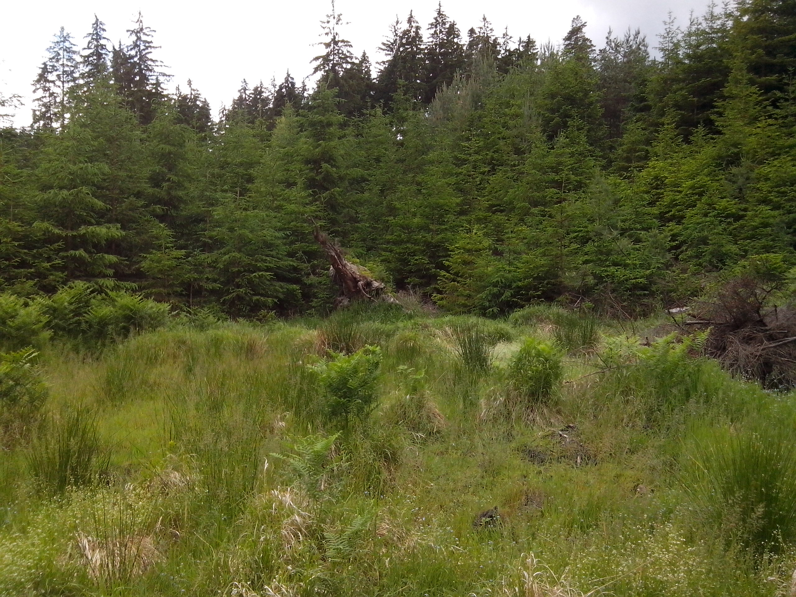 Ztracený rybník č. 2